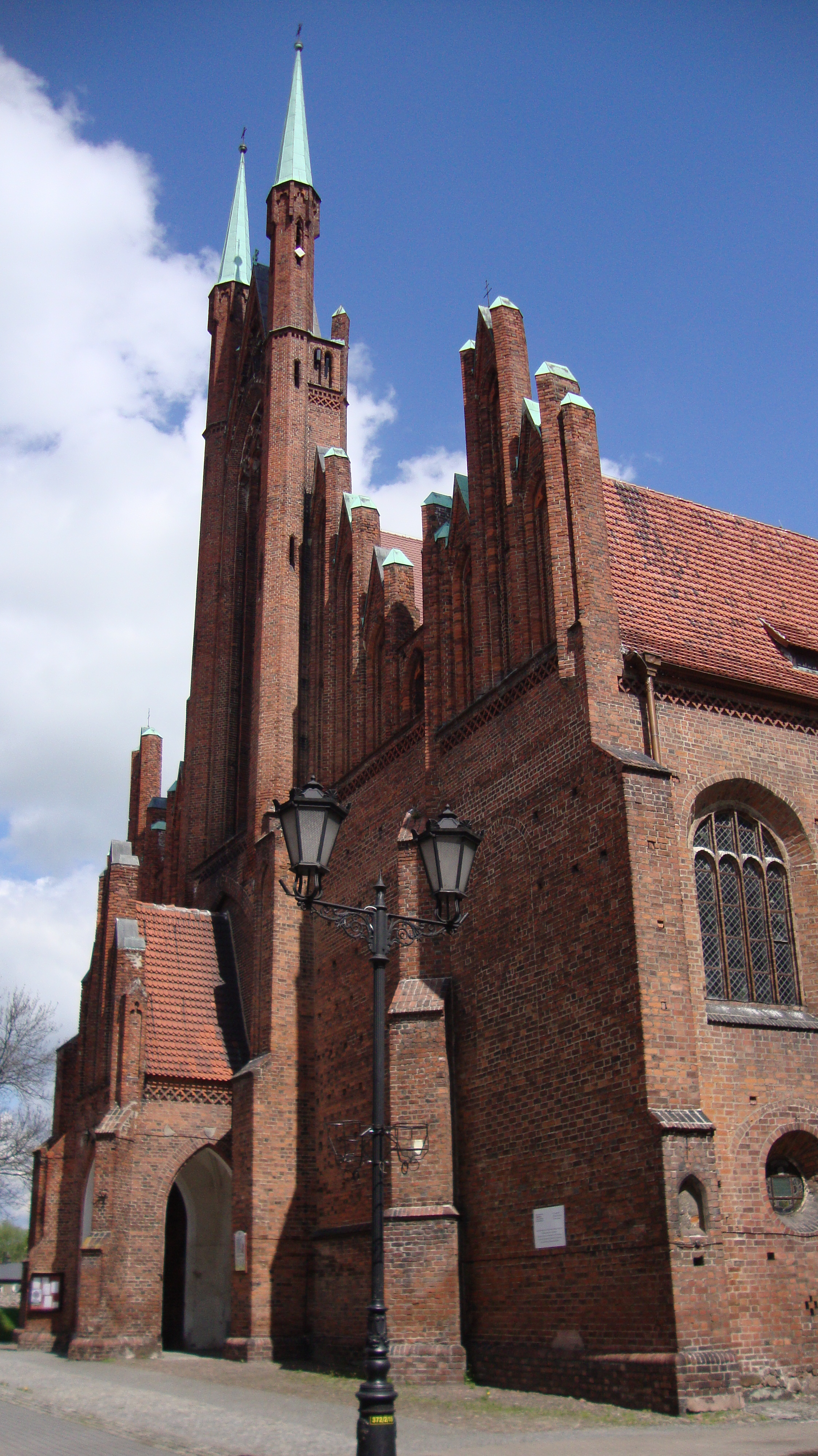 Świebodzin, kościół par. p.w. św. Michała Archanioła, XV, 1541, XVII, XIX